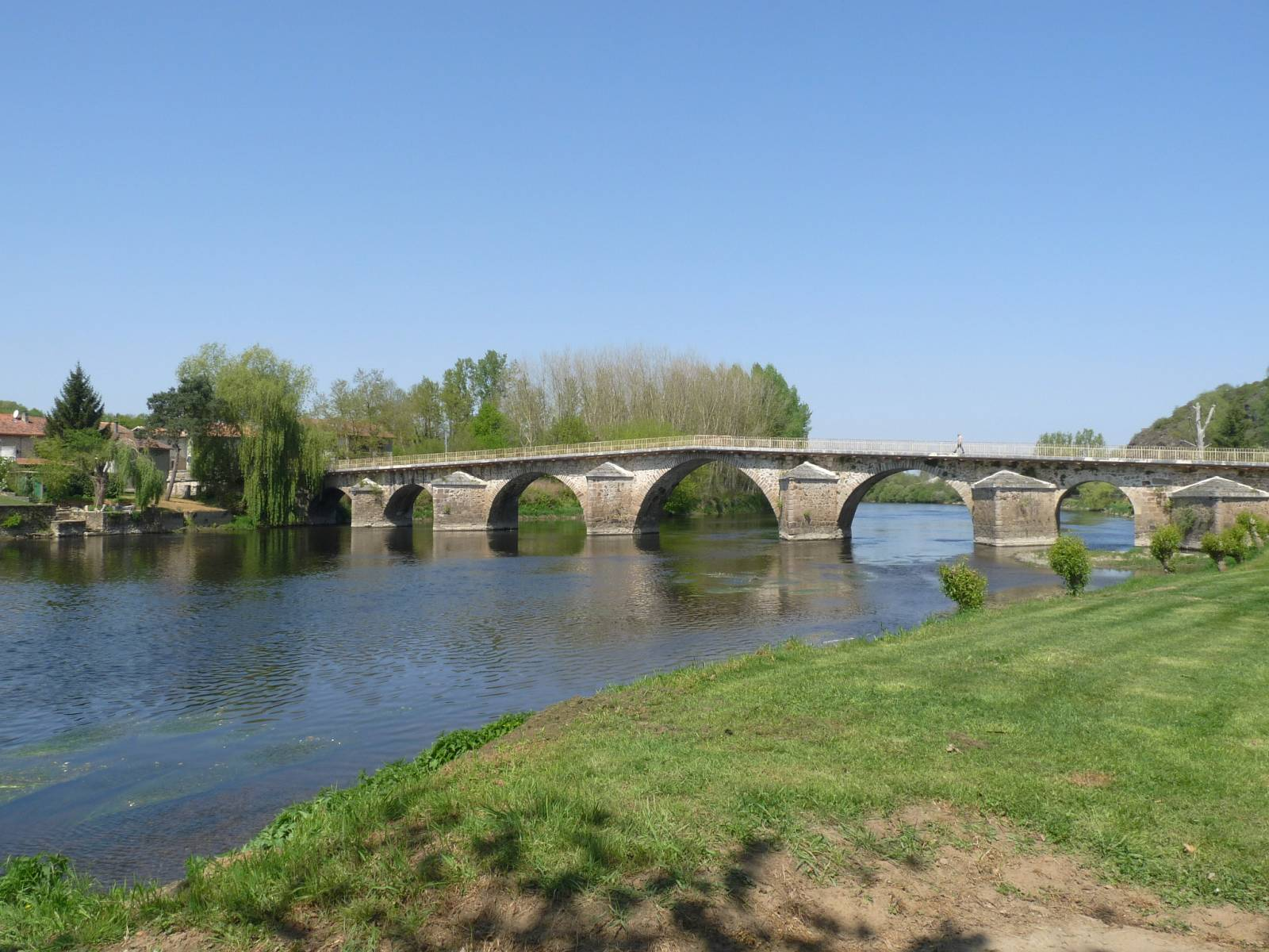 La Vienne et le pont de St-Germain-de-Confolens, Charente, France